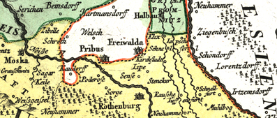 Ausschnitt aus einer Karte der Nieder- und Oberlausitz mit Muskau, Rothenburg, Priebus, Freiwaldau und Halbau